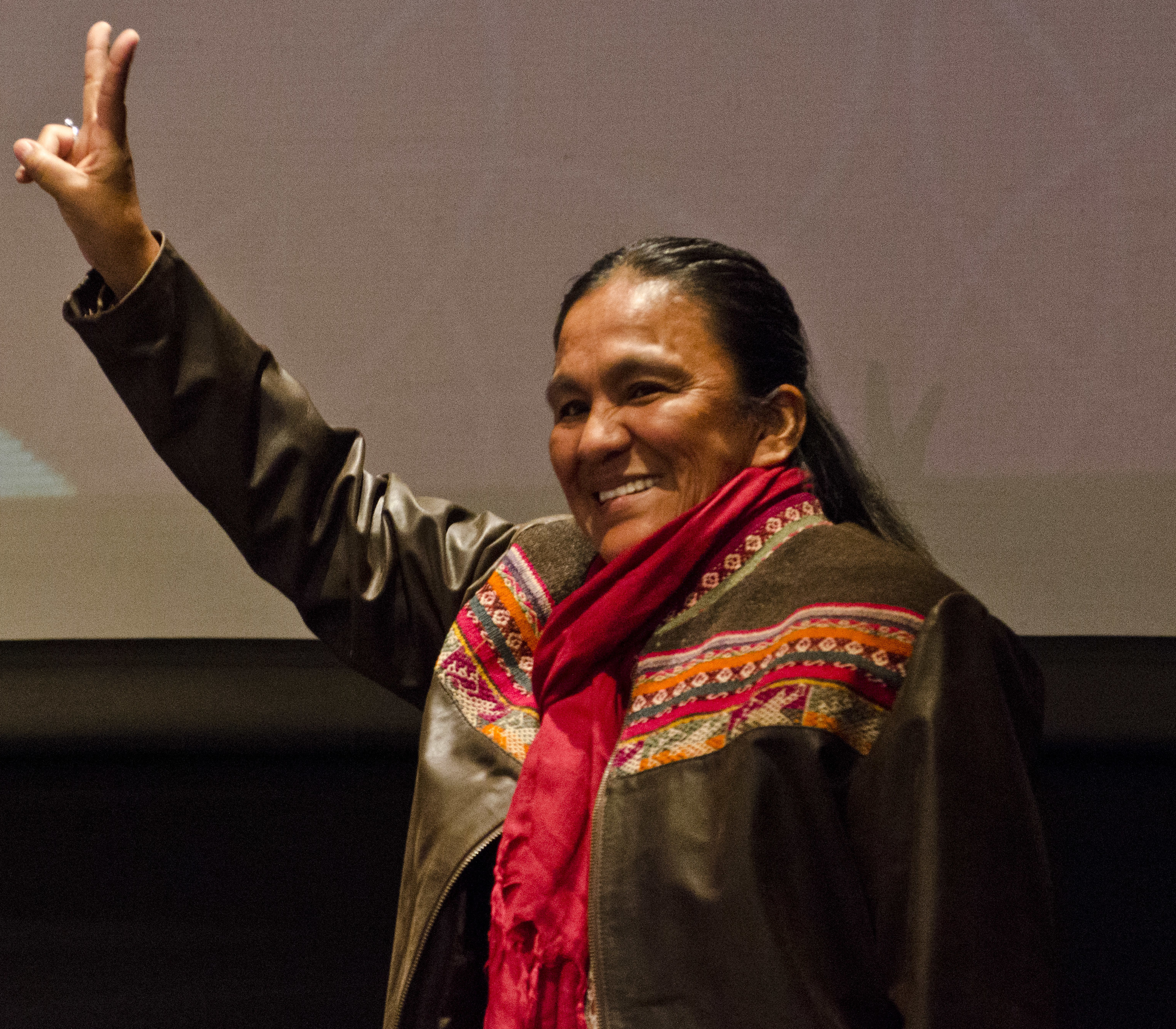 San Miguel de Tucumán, 6 de julio de 2015 – En el marco del “ Foro por una Nueva Independencia, Nacional y Latinoamericano ” que se lleva a cabo en el Teatro San Martín se realizó la mesa “Con mujeres tendrá que pelear” con los disertantes Hebe de Bonafini (Argentina), Milagro Sala (Argentina) y Máxima Apaza (Bolivia), Piedad Córdoba (Colombia). Moderó Marta Dillon.Fotos:Romina Santarelli/ Ministerio de Cultura de la Nación